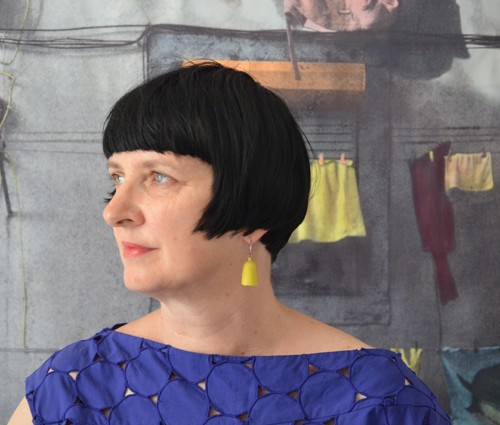 Monika Pichler (2013)